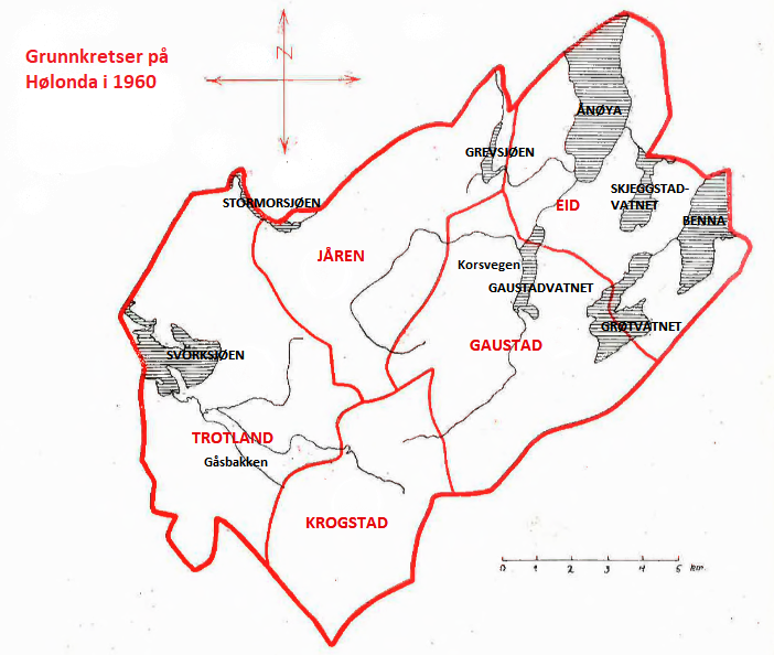 De fem grunnkretsene på Hølonda i 1960.